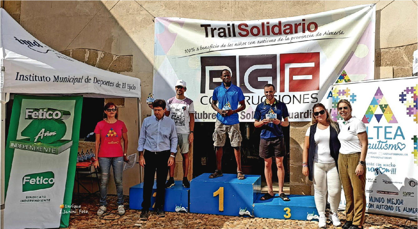 Podium de ganadores Altea-El Ejido Fetico